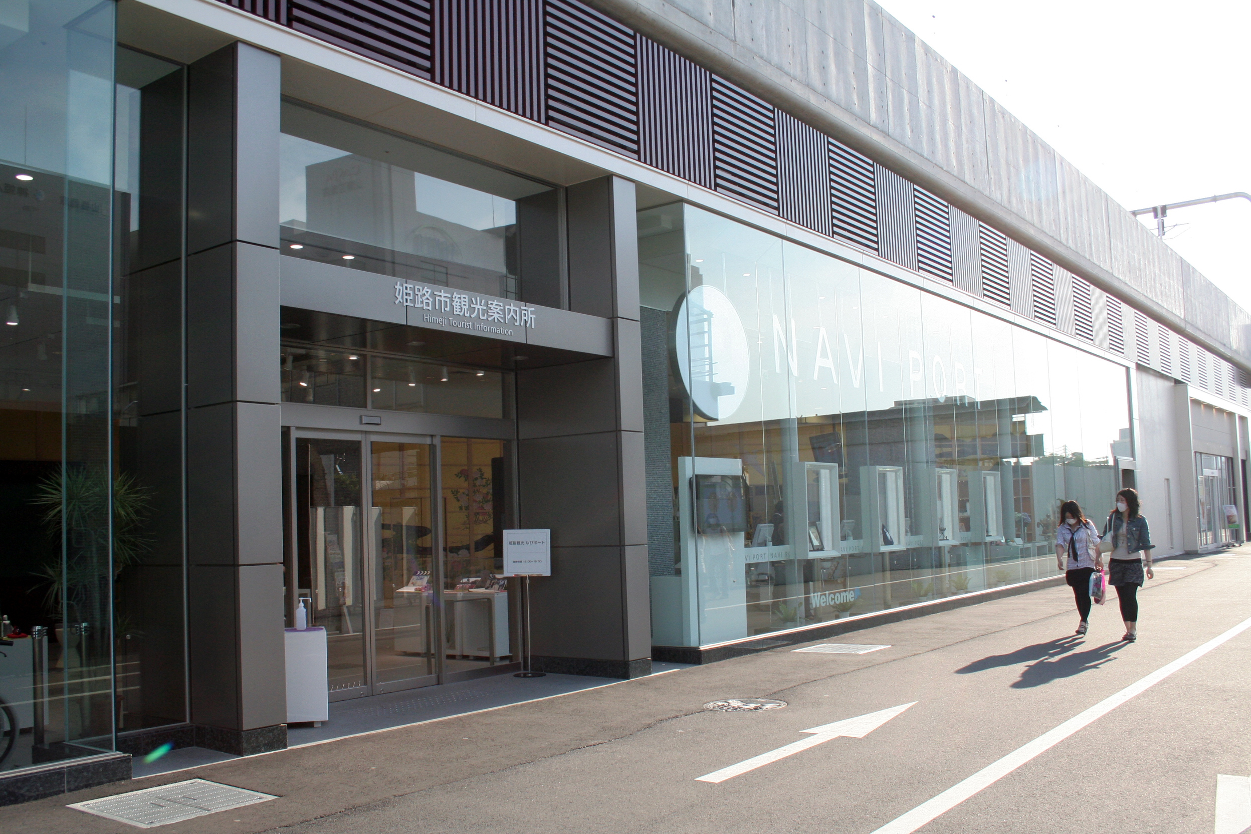 姫路駅北側出入り口にある姫路市観光案内所。